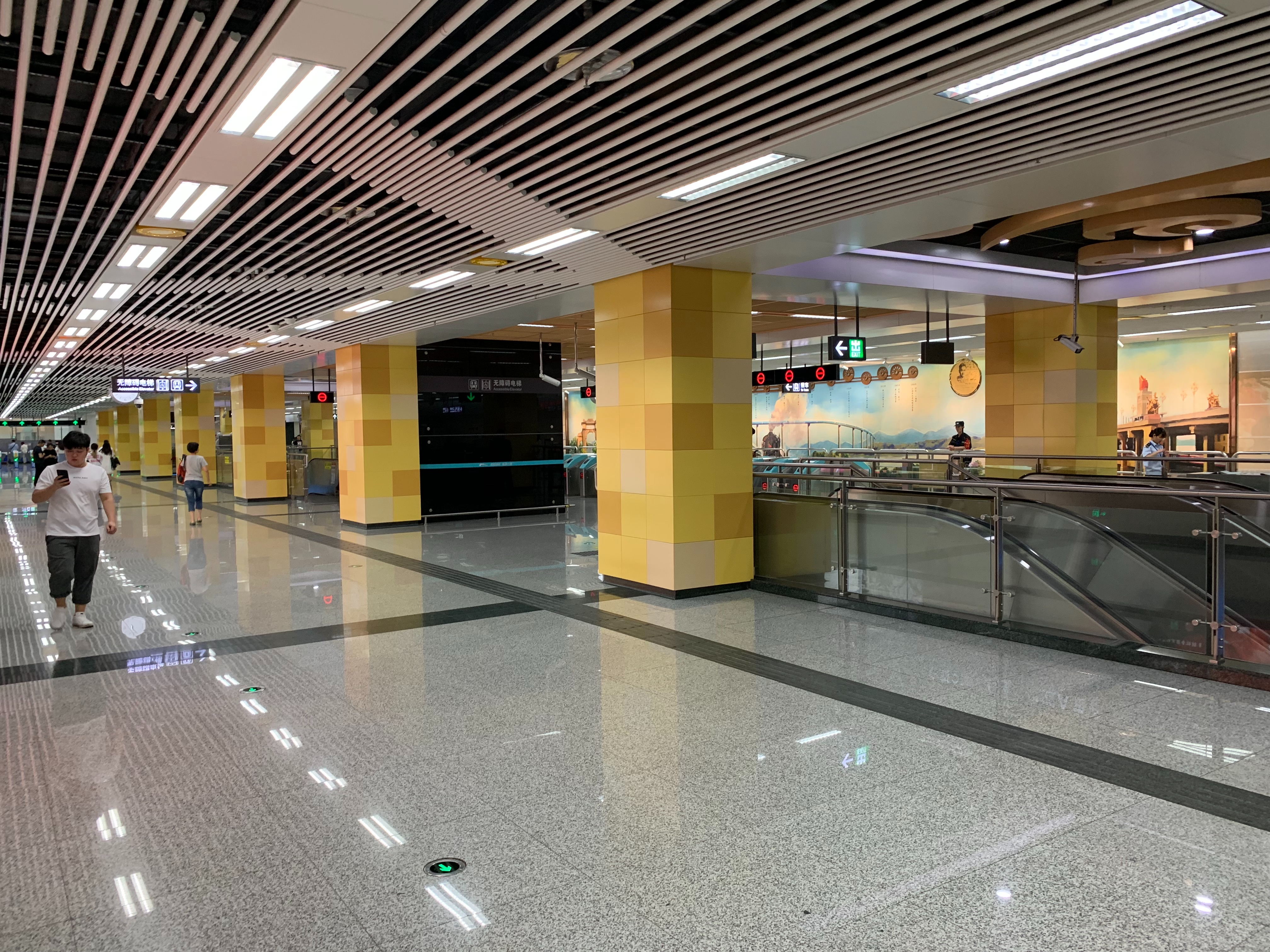 成都地铁西南交大站